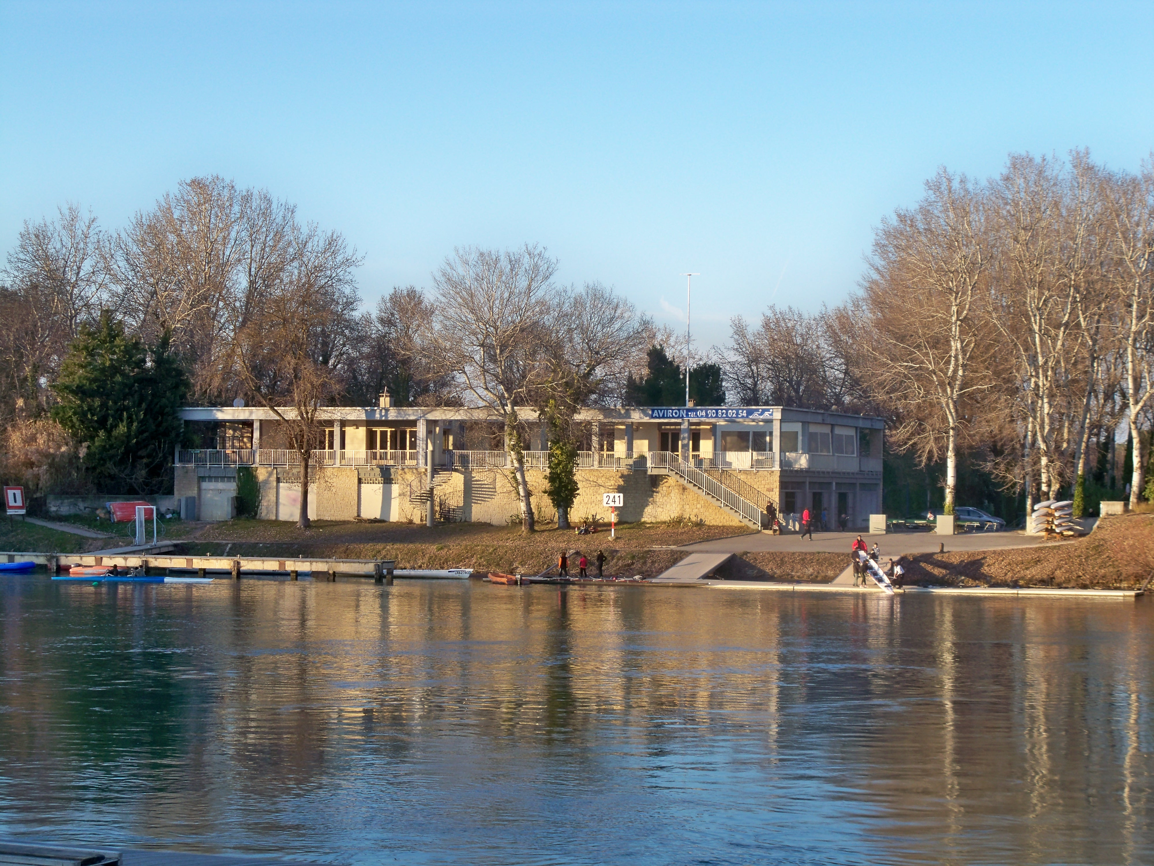 club d'aviron à Avignon, Vaucluse, France